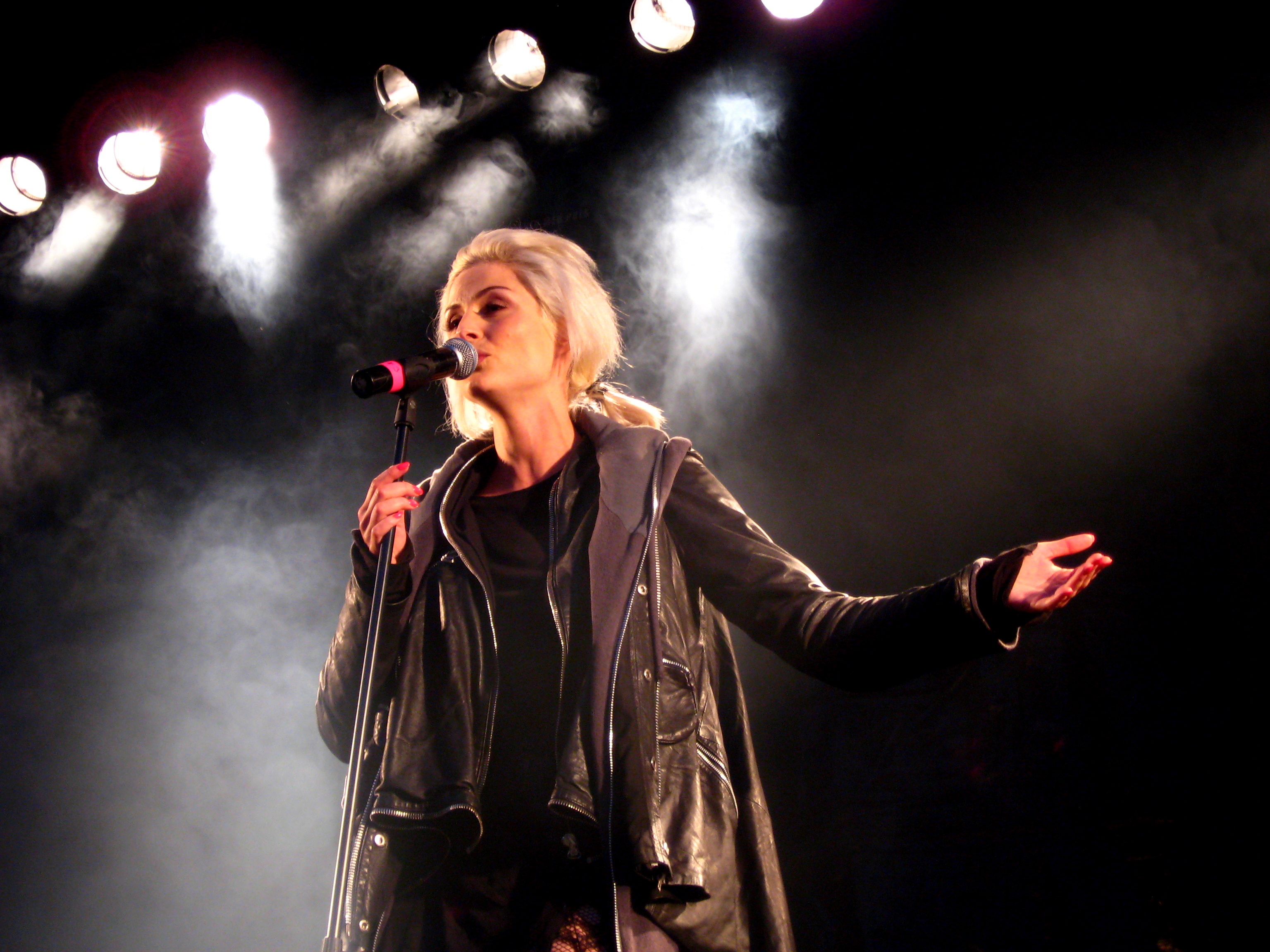 Stine Hjelm Jacobsen - Electric Lady Lab i Hjørring, 2011